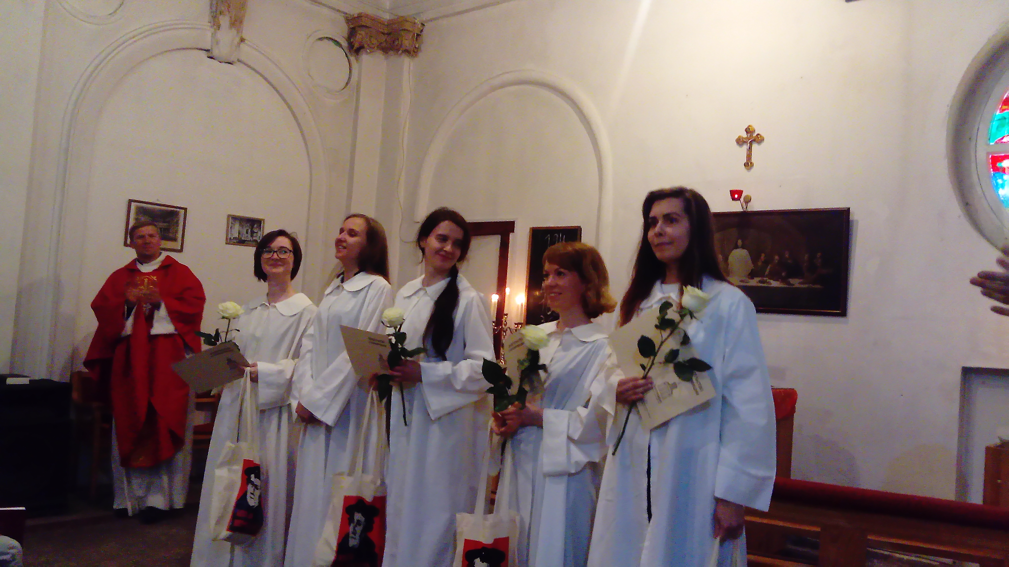 Конфирмация в часовне Анненкирхе (Санкт-Петербург) на день Аугсбургского исповедания (25 июня). Слева направо: пастор Иван Лаптев (в красной казуле), ?, Луиза Кузьмина, Ирина Кузьмина, Инна Нипполайнен, Мария Ашуркова. Конфирманты одеты в альбы, держат в руках белые розы, сумки с изображением Мартина Лютера и свидетельства о конфирмации